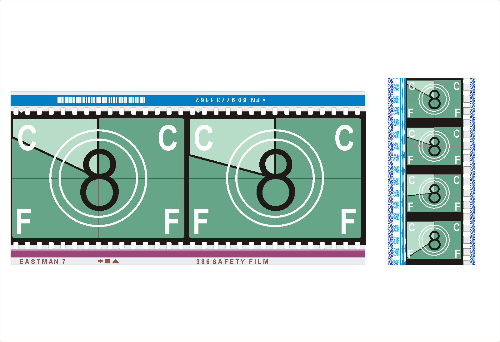 Srovnání formátů filmových kopií na 70mm a 35mm filmových pásech